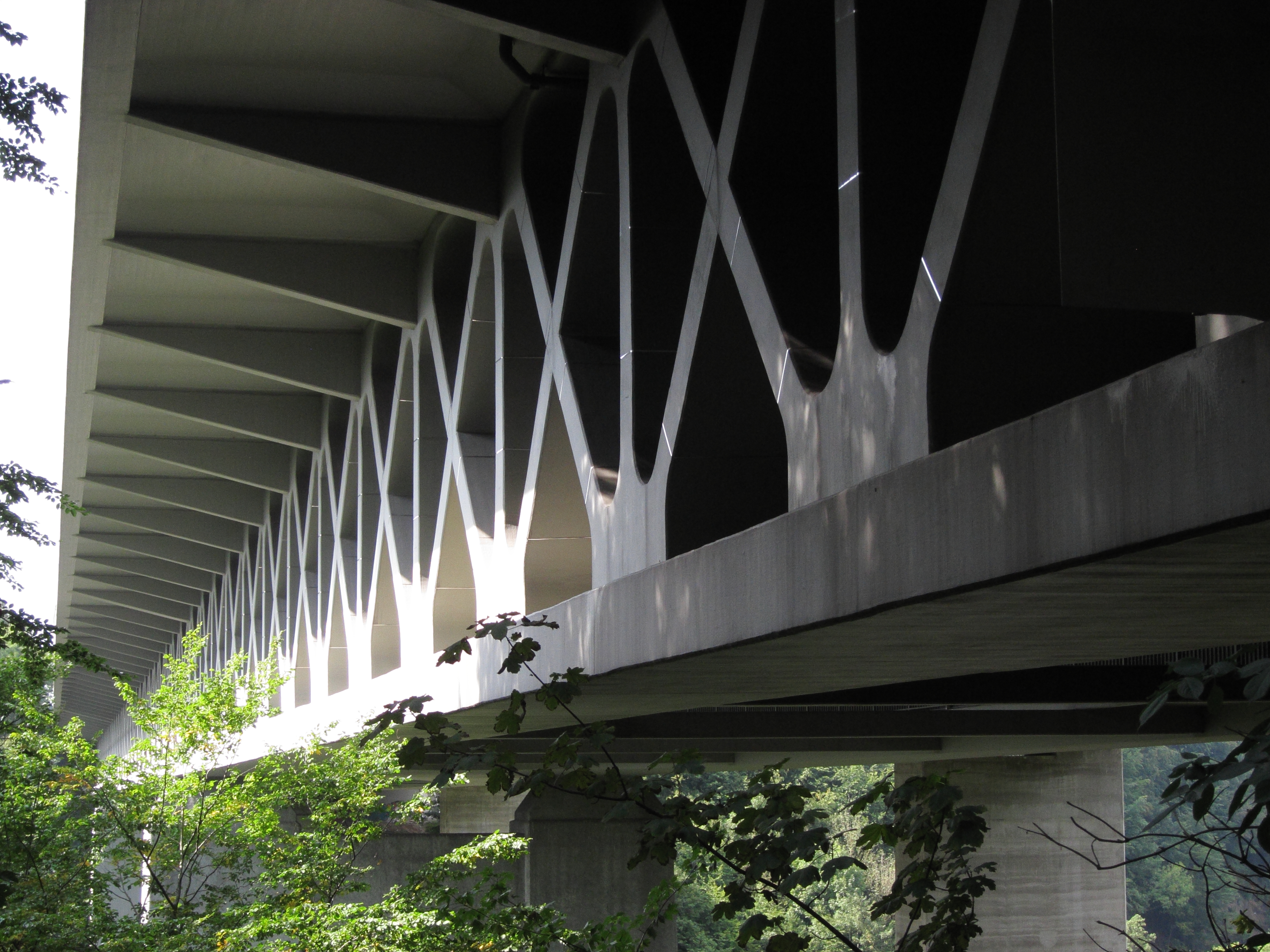 Mangfallbrücke, Blick auf den Fachwerkträger der alten Brücke